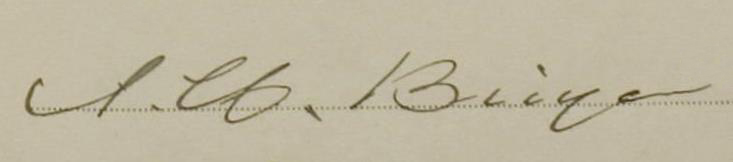 Подпись Антона Бёйена